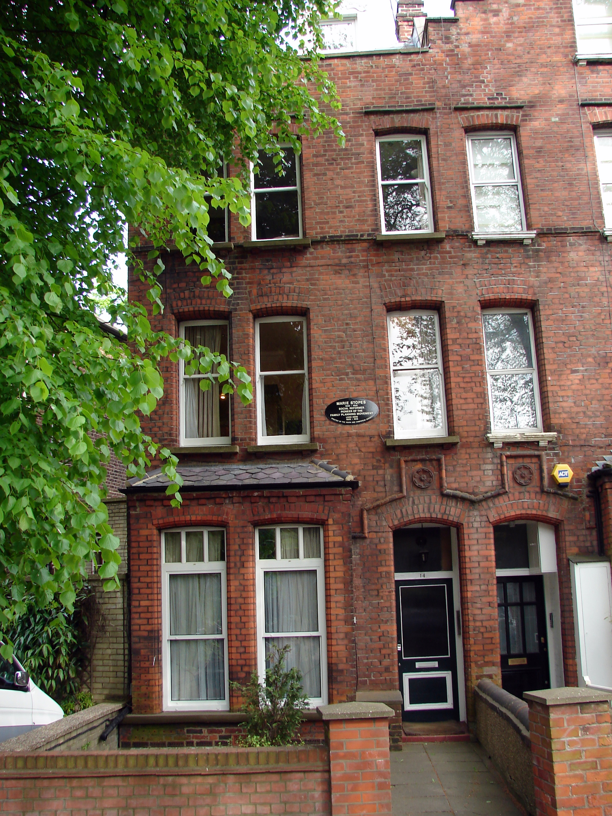 Marie Stopes